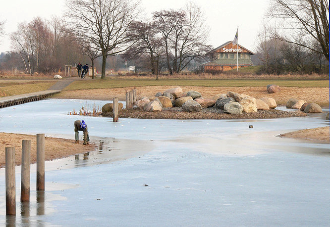 Wietzepark (Region Hannover)